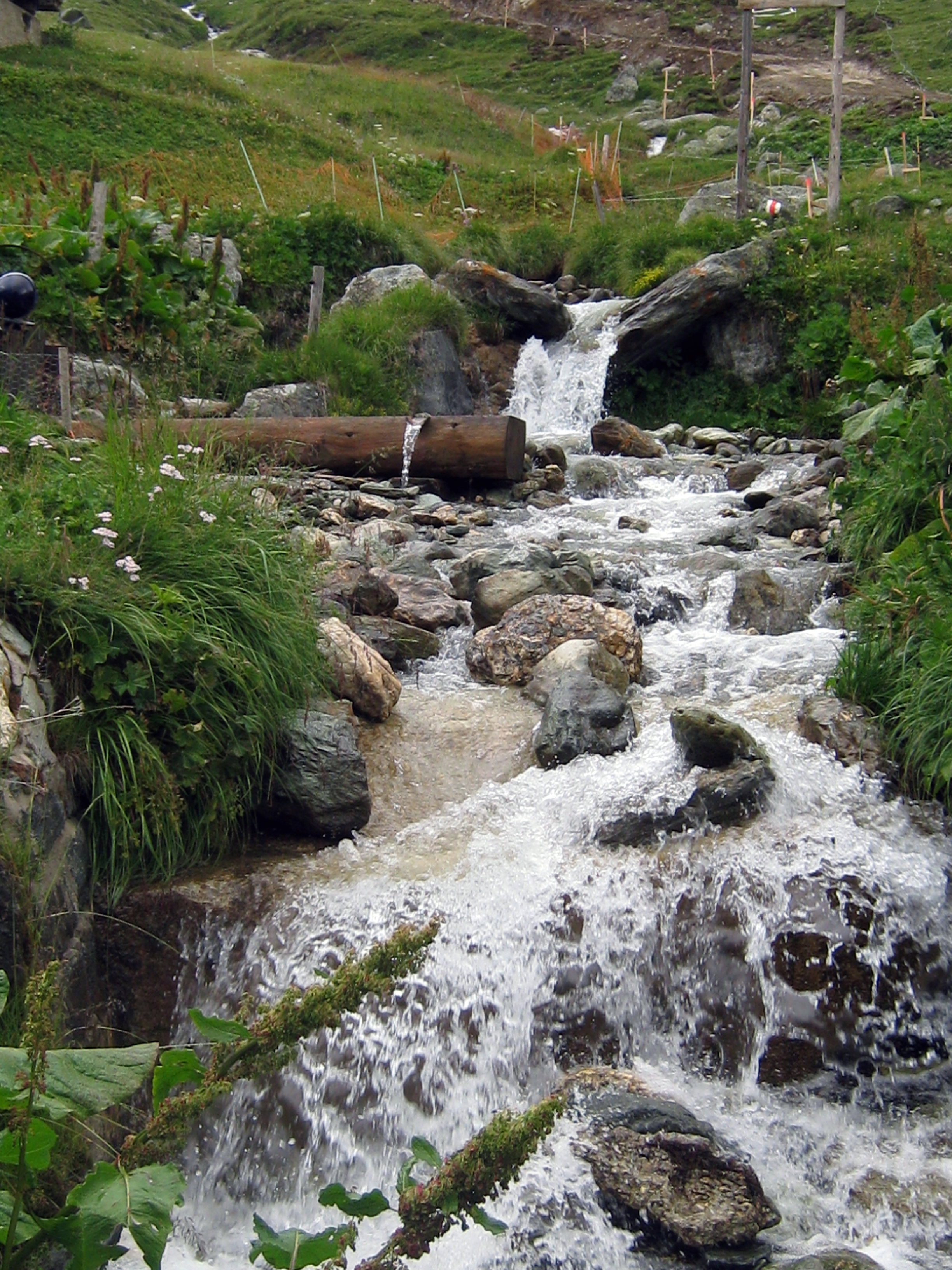 Juf, Schweiz